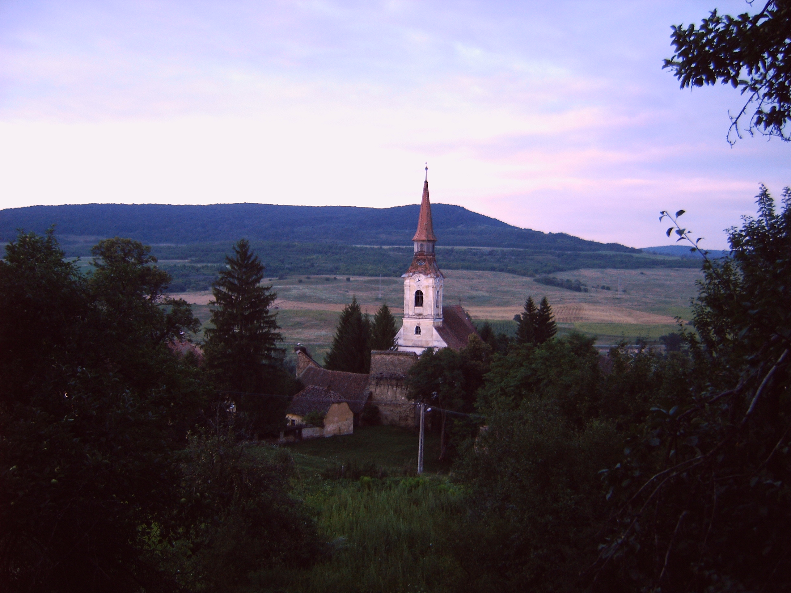 Blick auf die Deutschkreuzer Kirche (Siebenbürgen)